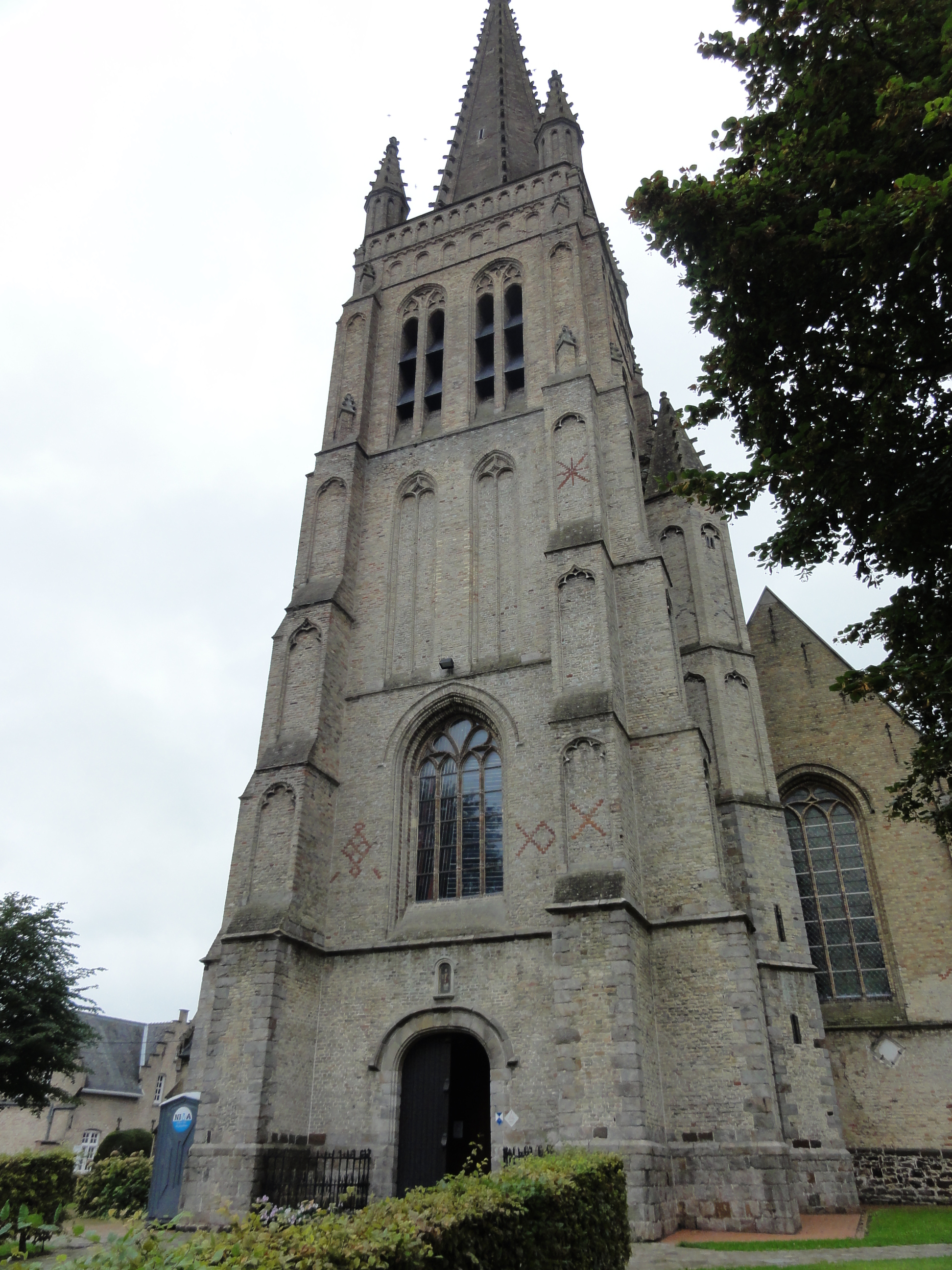 Parochiekerk Sint-Petrus en Paulus